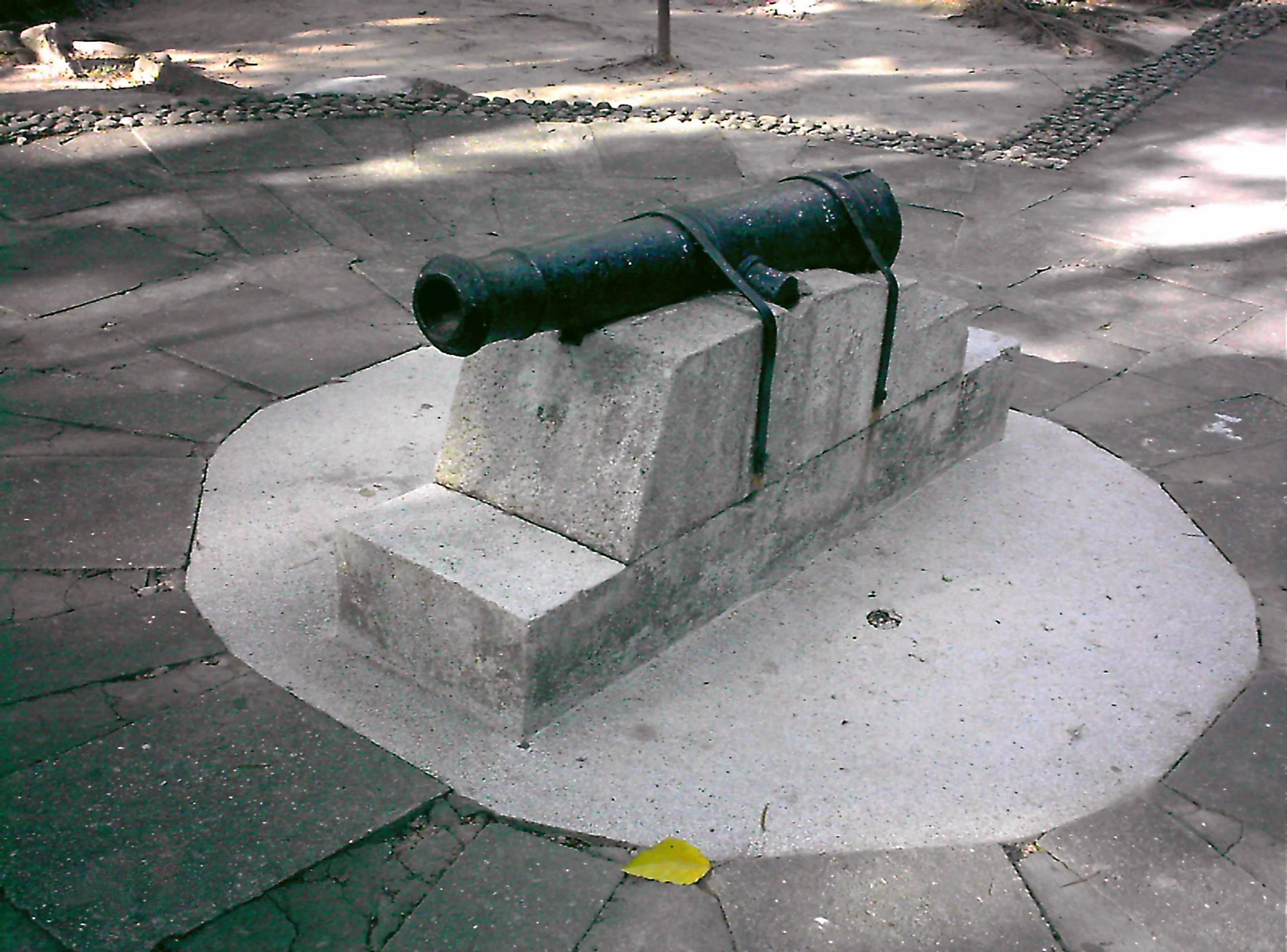 中文（香港）: 花墟公園：古炮臺